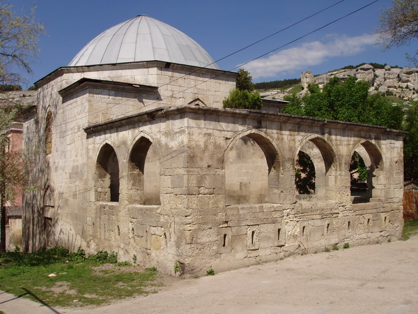 Назва за держреєстром пам'яток: Мавзолей «Ескі-Дюрбе»